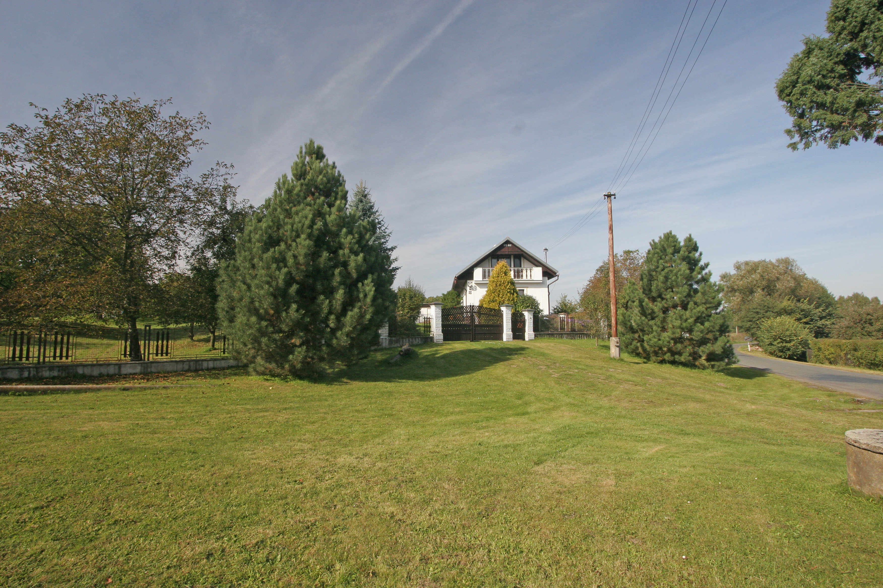 Sovoluská Lhota čp. 1